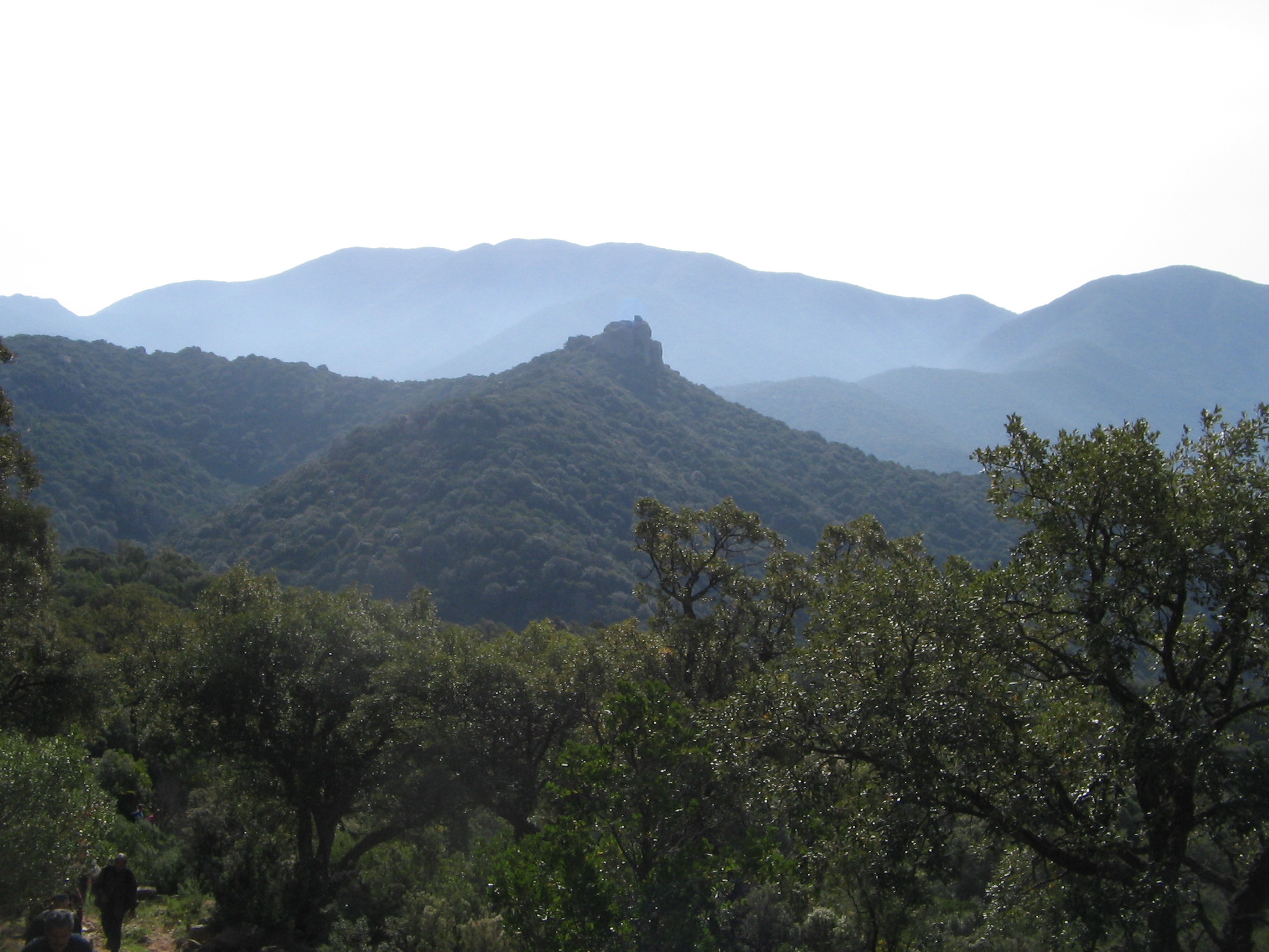 Sa Perda Posta In Tremini, Foresta di Pantaleo